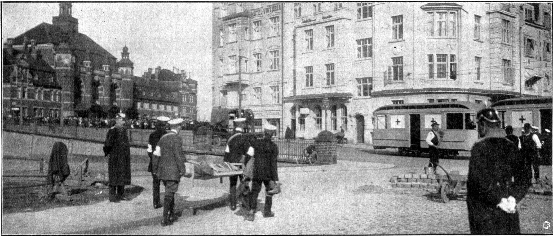 Transport deutscher Verwundeter in Lübeck